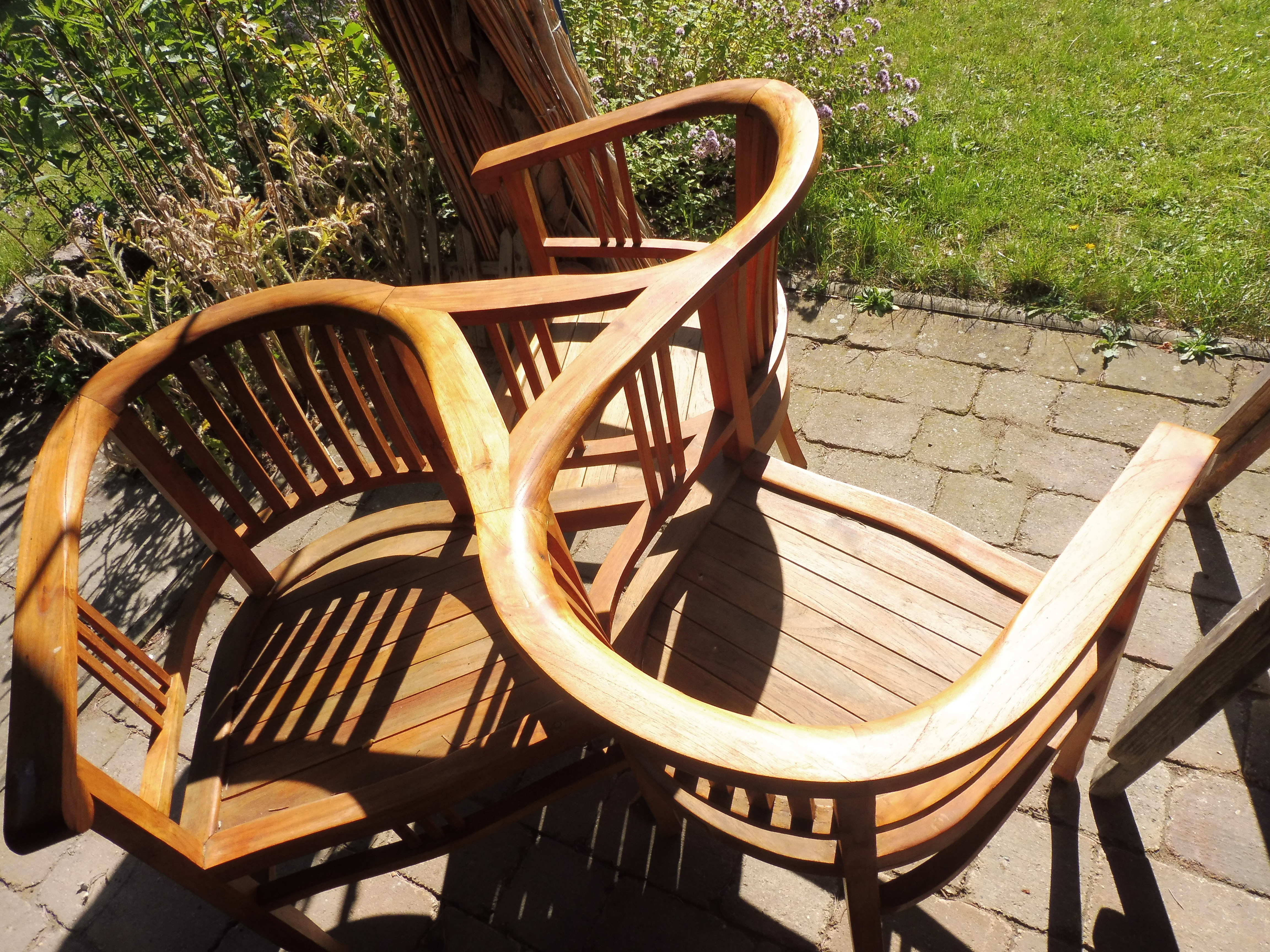 Drei miteinander verbundene Stühle. Jeder sieht jedem ins Gesicht.